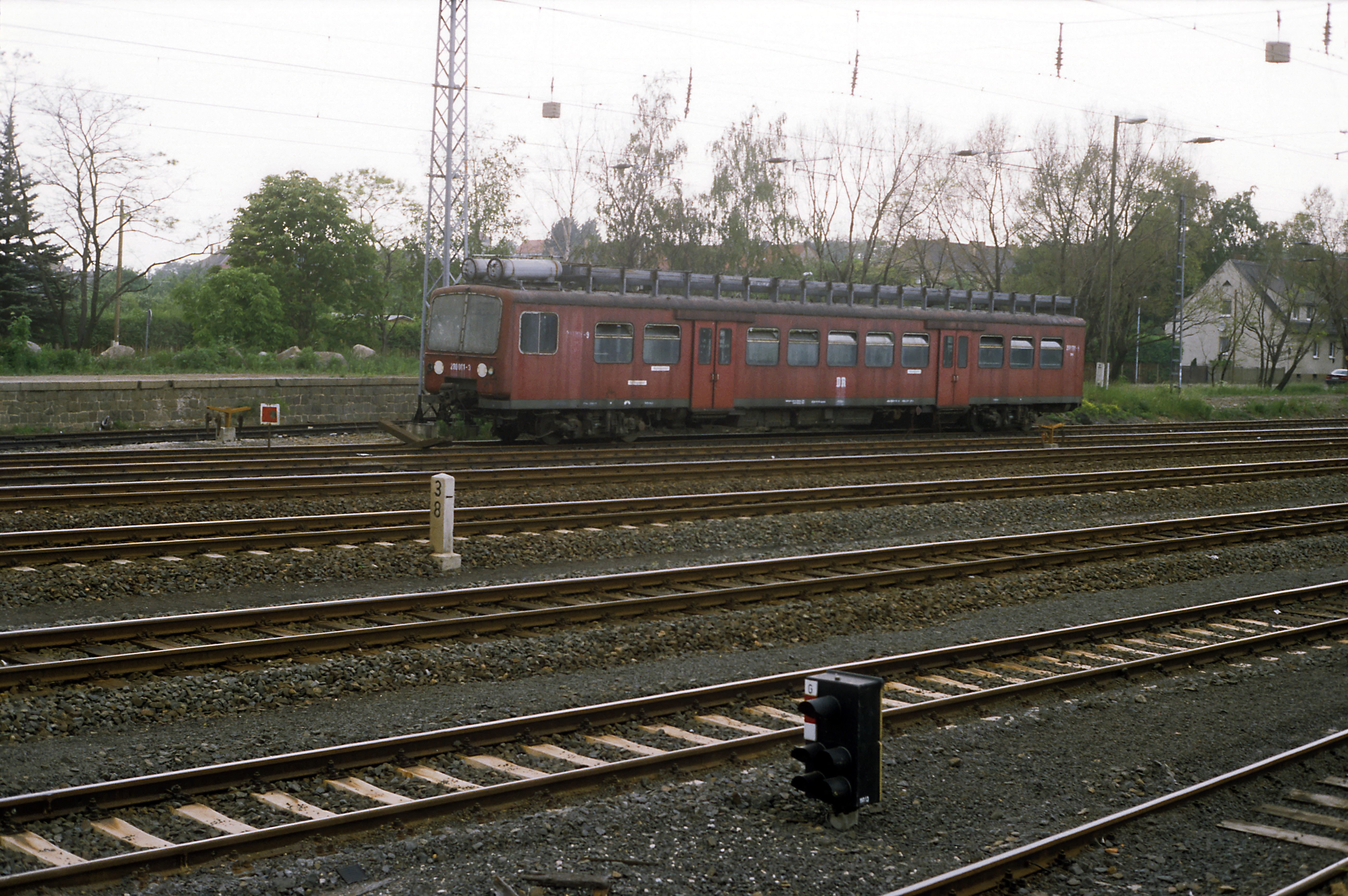 Ehemaliger Prototyp-S-Bahn-Triebzug für 15 kV, 162/3 Hz. Nach einem Fahrmotorschaden wurden die Wagen vor 1990 ausgemustert und sollten zu Fahrleitungsmontagewagen umgebaut werden. Dafür wurden der Dachaufbau und die Wasserbehälter für Waschwasser aufgesetzt. Ob die Wagen jemals dafür eingesetzt wurden, ist unwahrscheinlich. Die Kupplungen wurden nicht angepasst. 1993 steht der 280 001 schon alleine und in schlechtem Zustand im Bahnhof Beucha.